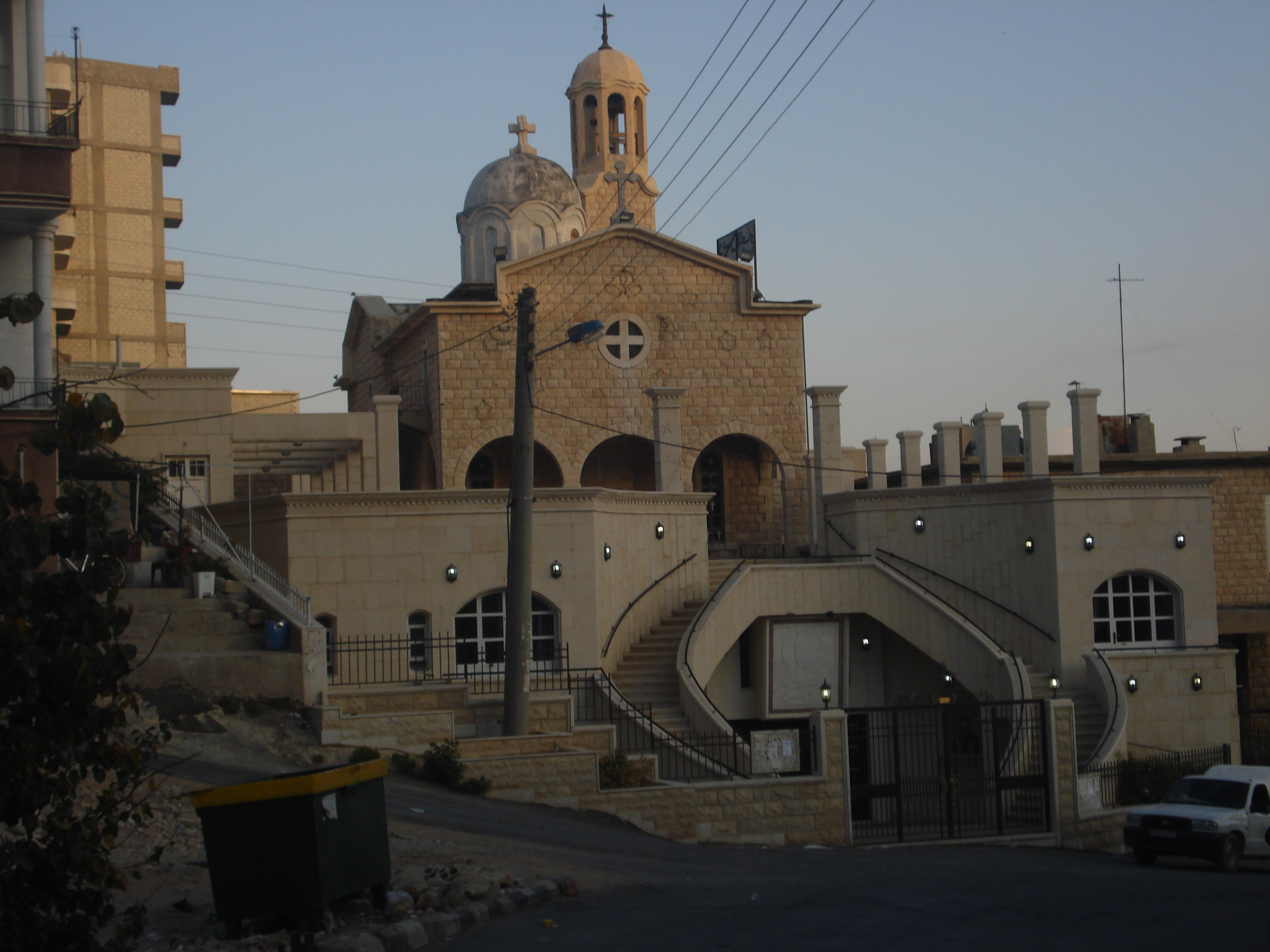 Մաալուլա